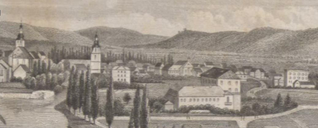 Pauluskirche, Wilhelmskirche, Oranienhof, Gymnasium, Viktoriastift in Kreuznach, Blick von Süden (Ausschnitt), vor 1838